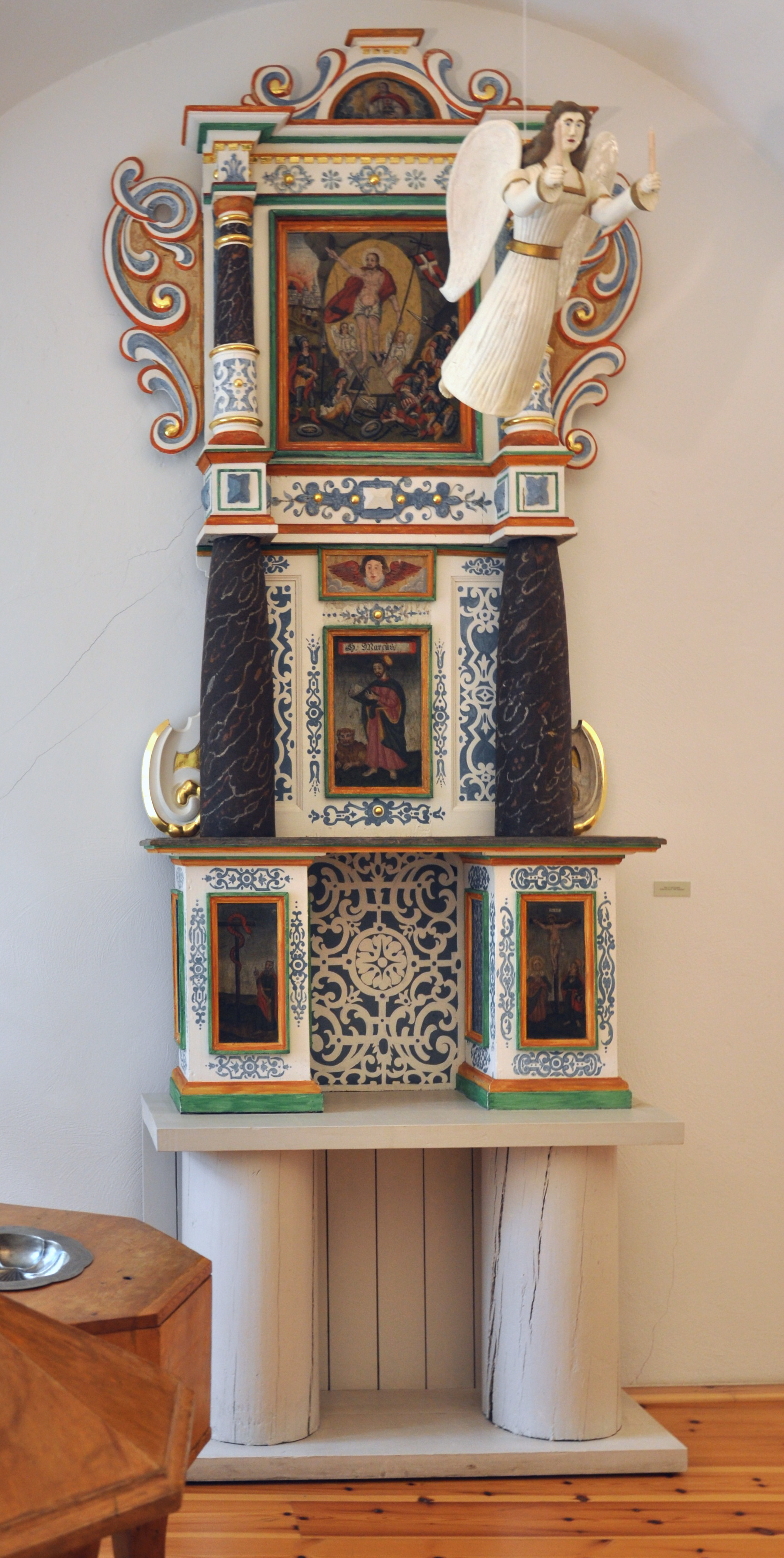 Museum Senftenberg (im Schloss Senftenberg) Altar (17. Jahrhundert) aus der Dorfkirche Sorno, 1993 restauriert